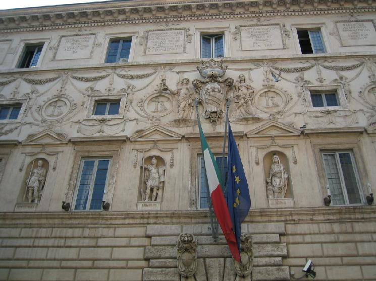 Borromini: Fassade des Palazzo Spada in Rom.